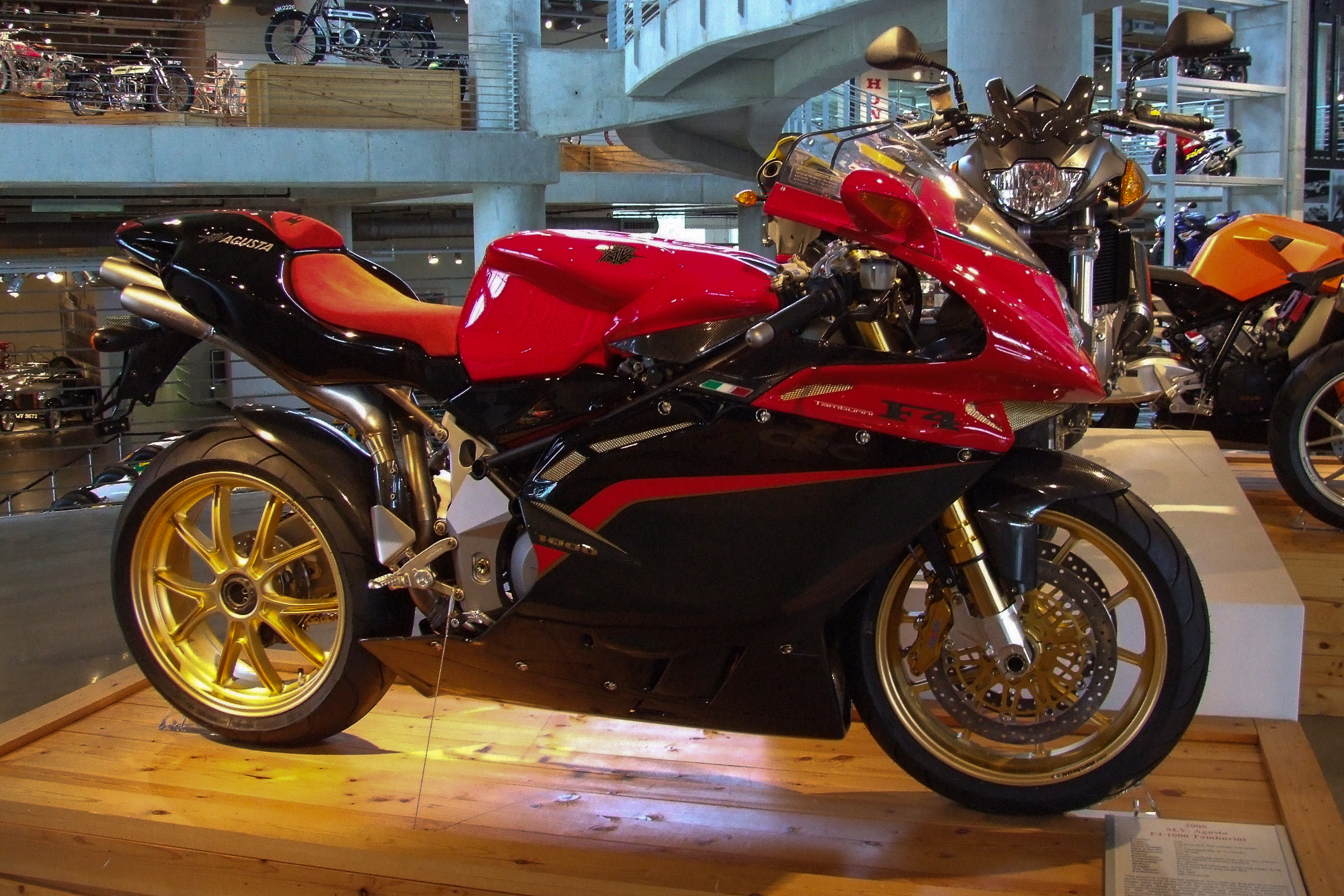 MV Agusta F4-1000 Tamburini (2006) im Barber Vintage Motorsports Museum, Birmingham Alabama USA